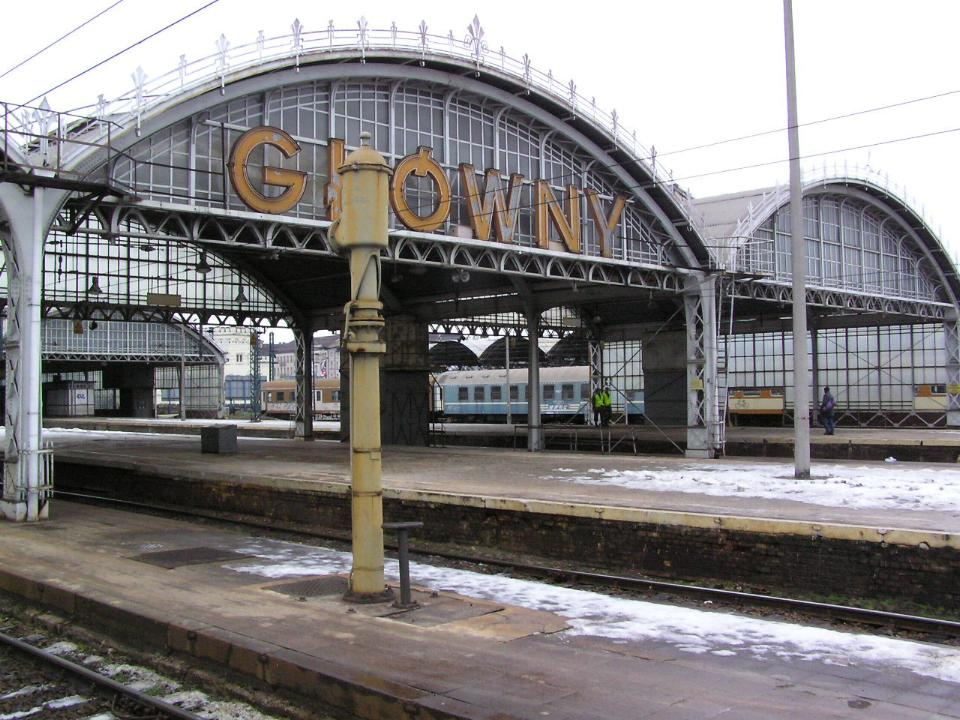 Dworzec Główny we Wrocławiu , Main Train Station in Wrocław, Hauptbahnhof in Wrocław